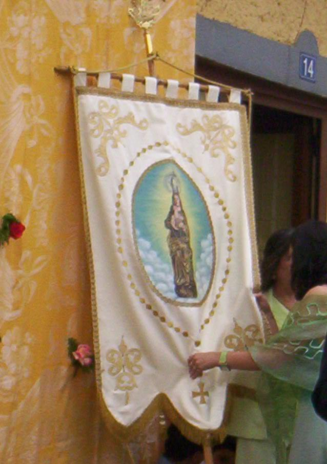 Estandarte de la Virgen del Rosario, en las fiestas de Gallegos del Pan (Zamora)